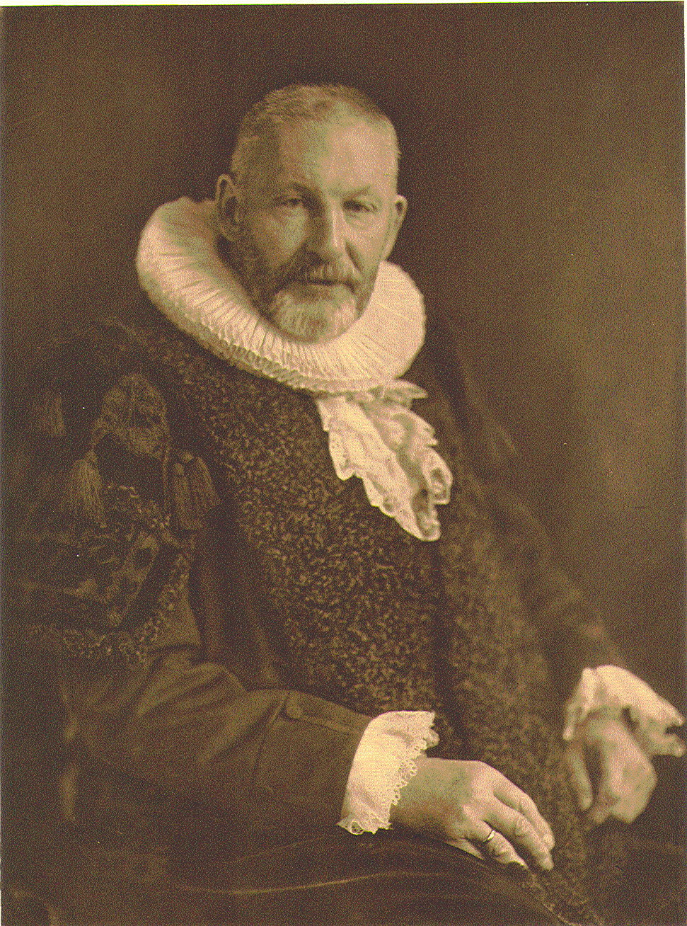 Johann Refardt (1843–1917), Hamburgischer Senator und Kaufmann. Fotogravüre (Heliogravüre)